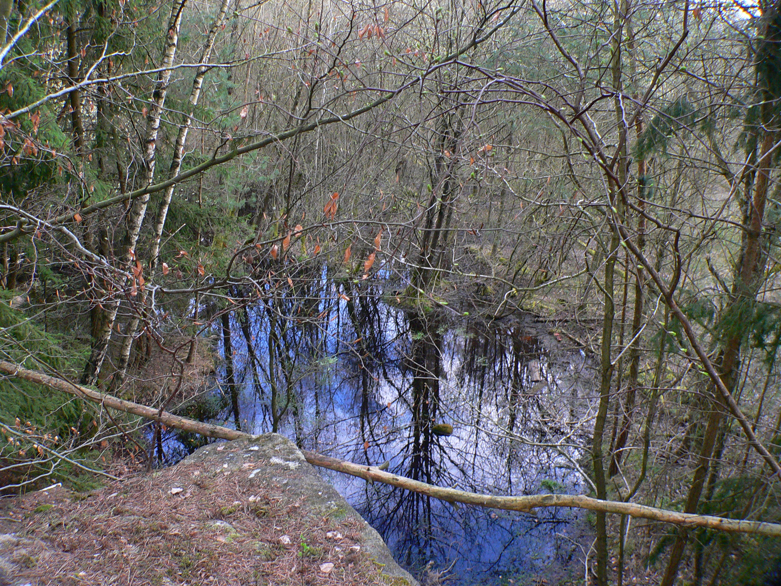 Alter Steinbruch im Landschaftspark Schloss Hohenstein, Ahorn bei Coburg, Bayern, Oberfranken, Deutschland